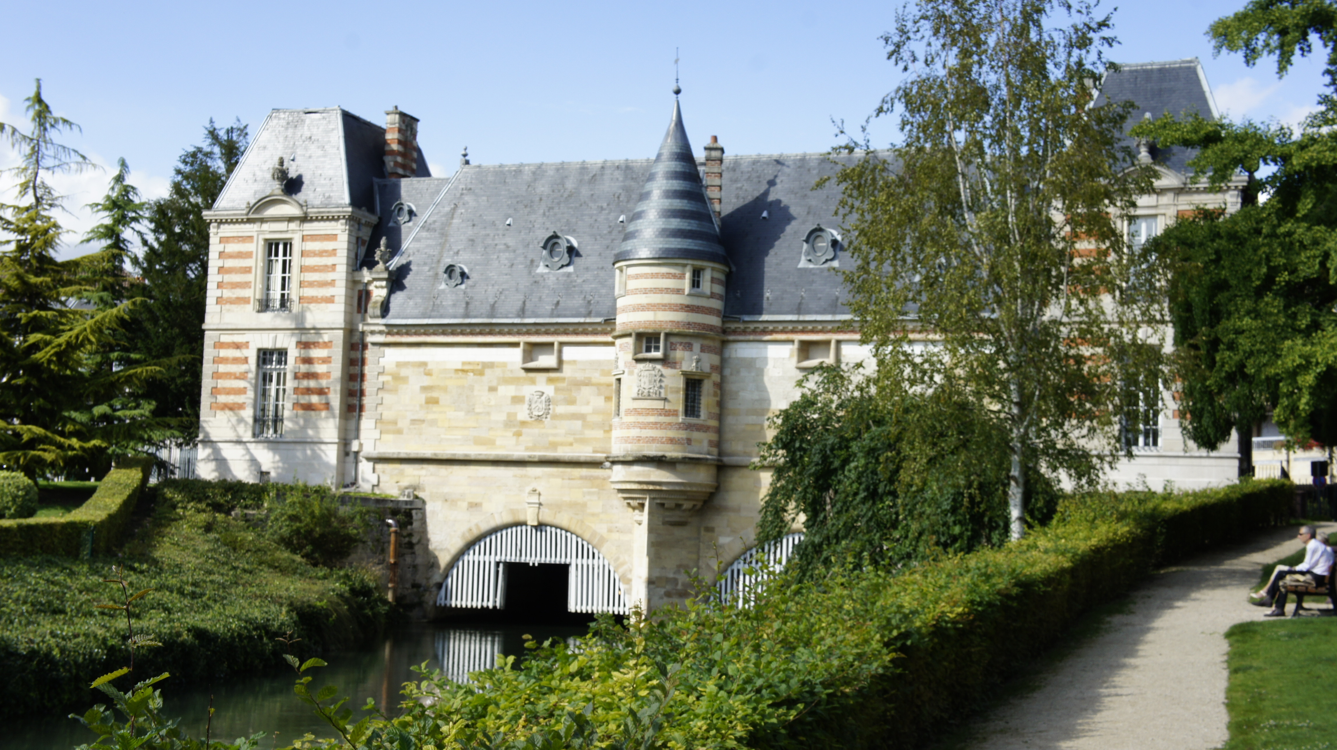 le jardin du Jard vers le château du marché .